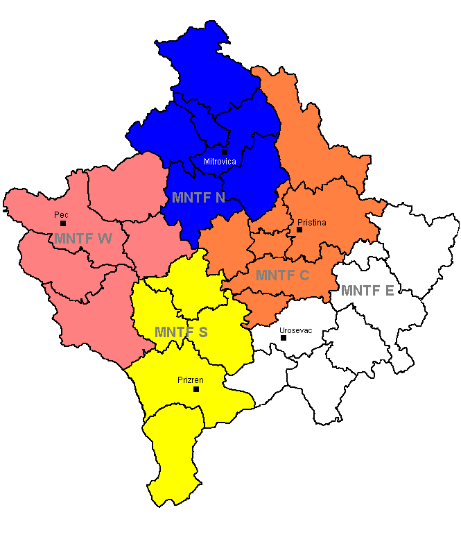 Struktur KFOR 2006